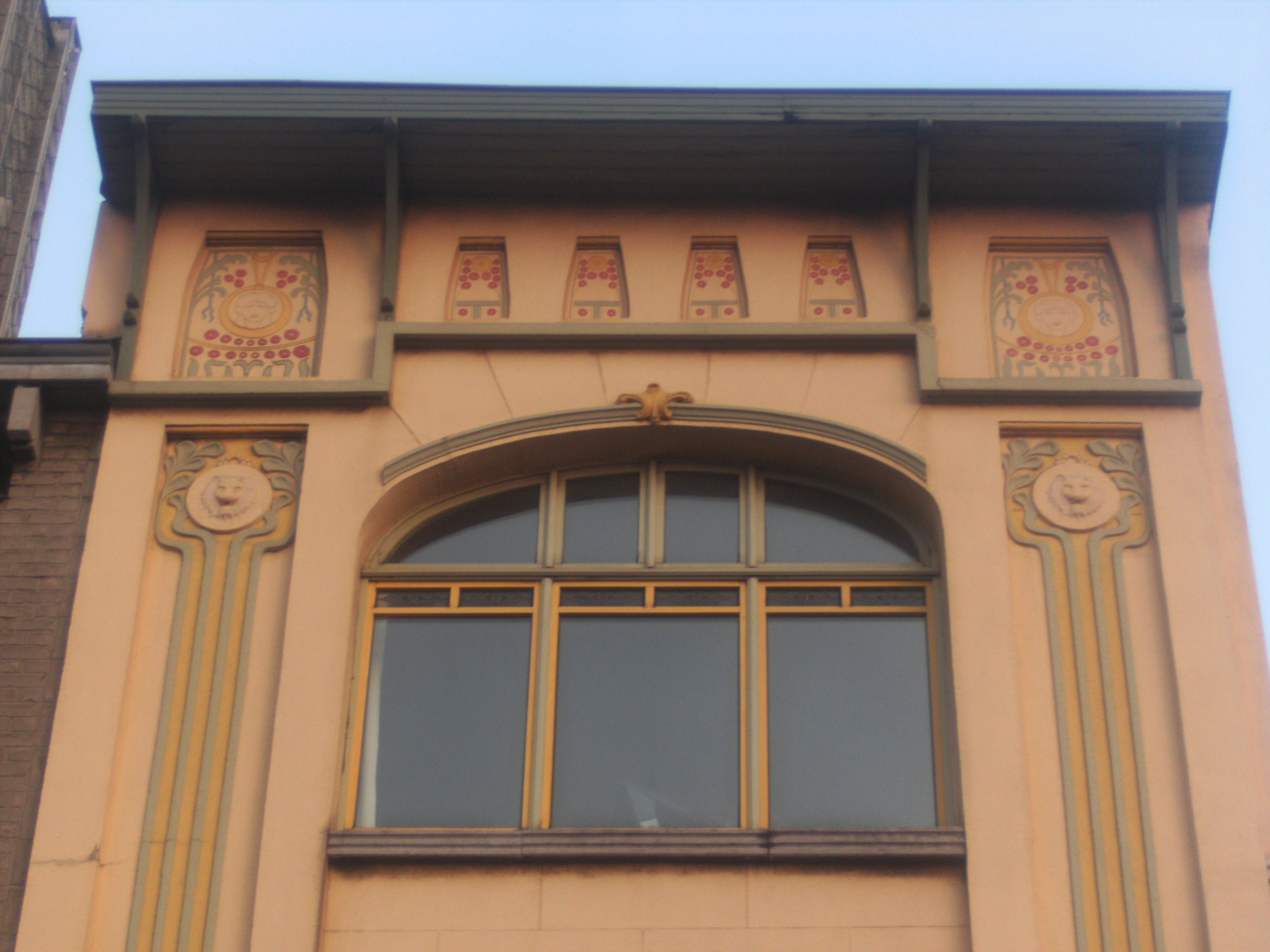 Charleroi (Belgique) - Maison La Fleur située boulevard Solvay, 7. Style Sécession viennoise - Construite en 1908 par François Giuannotte (archtecte) pour Joseph Charon (entrepreneur) - rénovation par Paul Warin et Luc Schuiten (architectes).